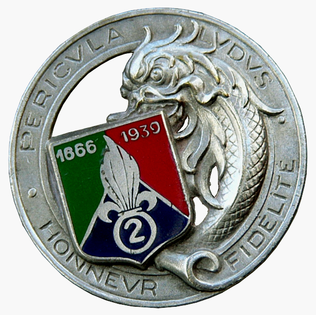 Insigne régimentaire du 2e régiment étranger de cavalerie